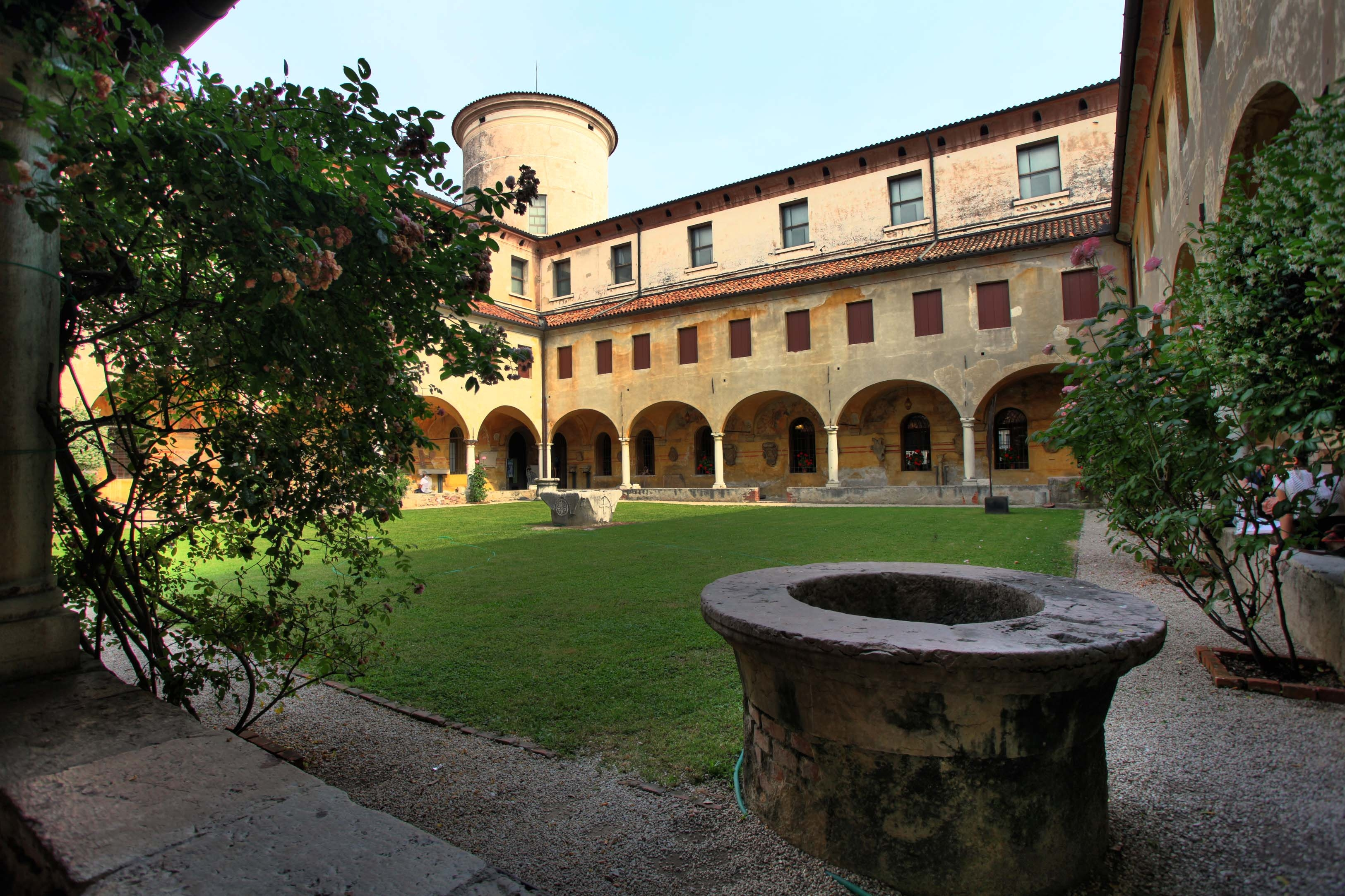 Il Chiostro all'ingresso del Museo Civico di Bassano del Grappa